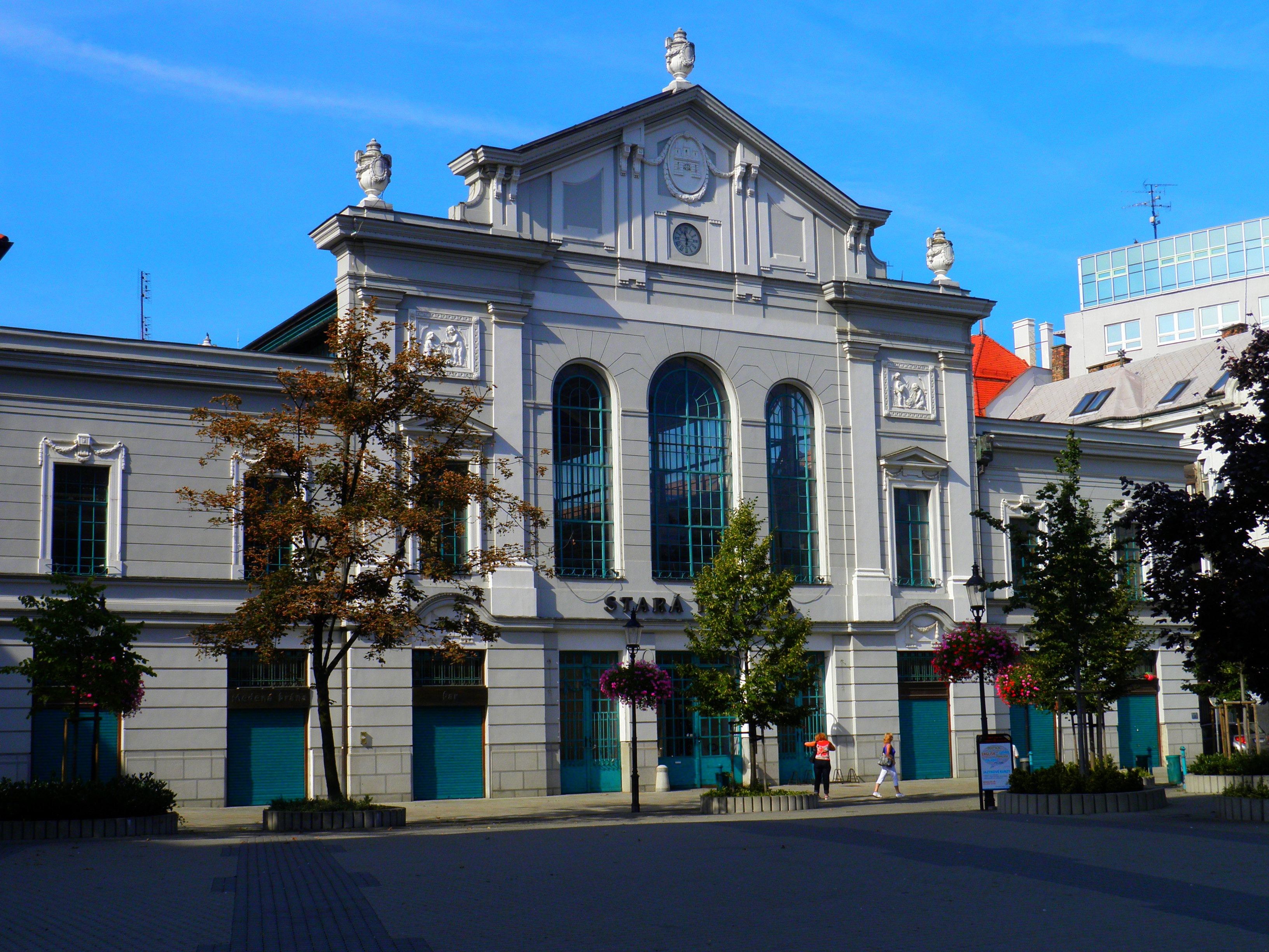 Stara Tržnica